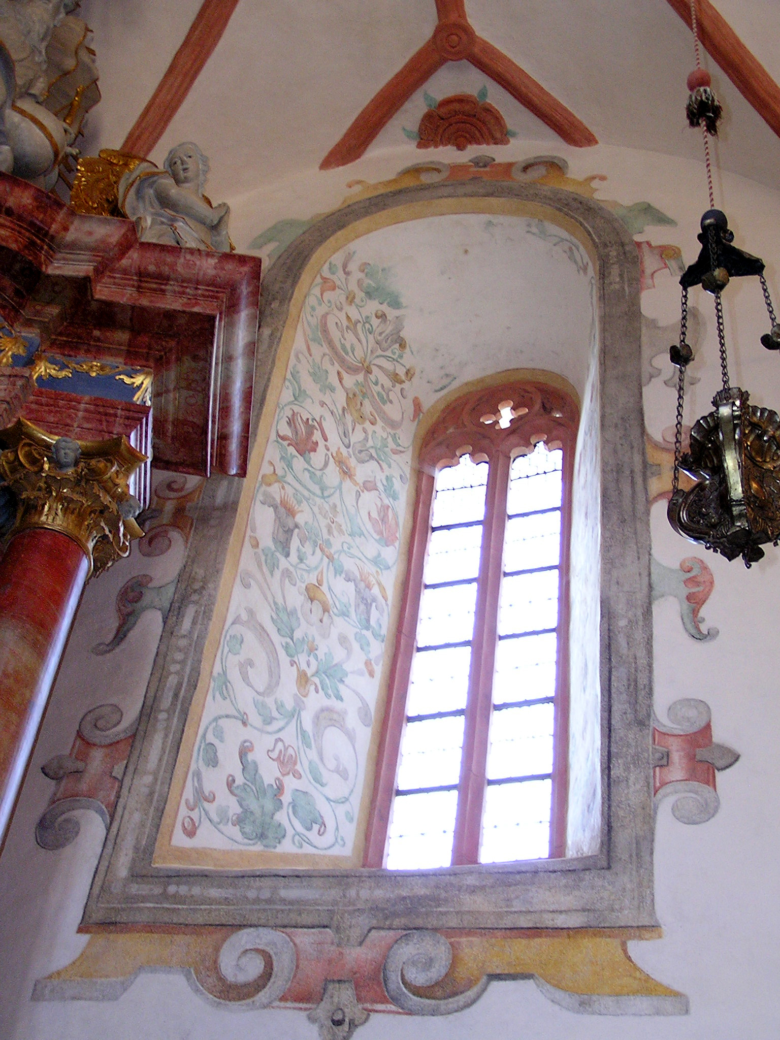 Kaplnka